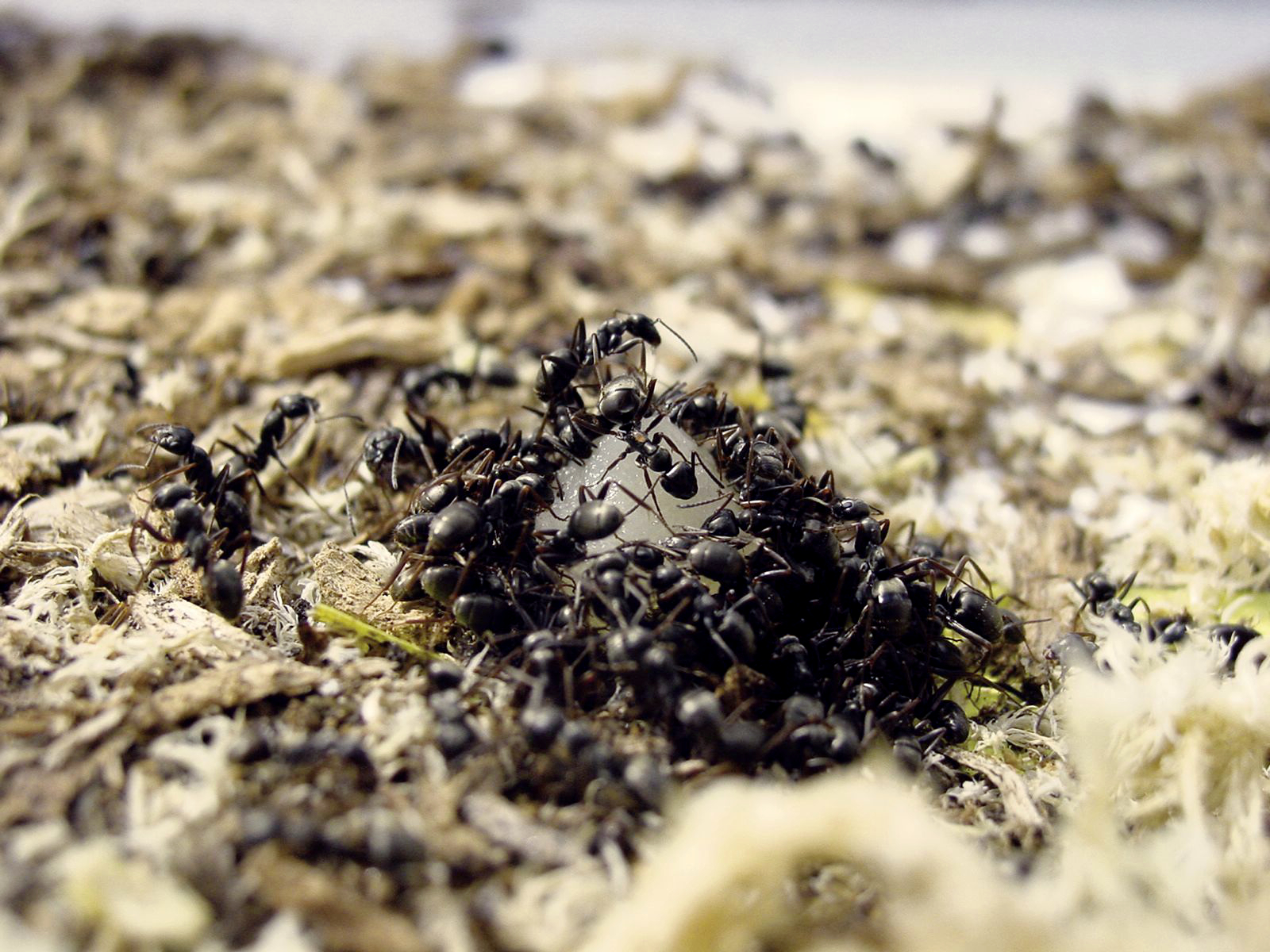 Formica fusca feeding